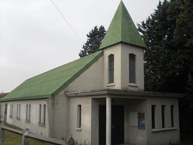 La chapelle Notre-Dame-de-l'Espérance de Morangis (91)